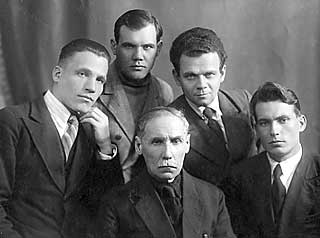 Приморские поэты и писатели (слева направо): М. Бондарь, Василий Кучерявенко (1910-1982), Вячеслав Афанасьев (1903-1943), Александр Артемов (1912 – 1942), Трофим Борисов (1882—1941).